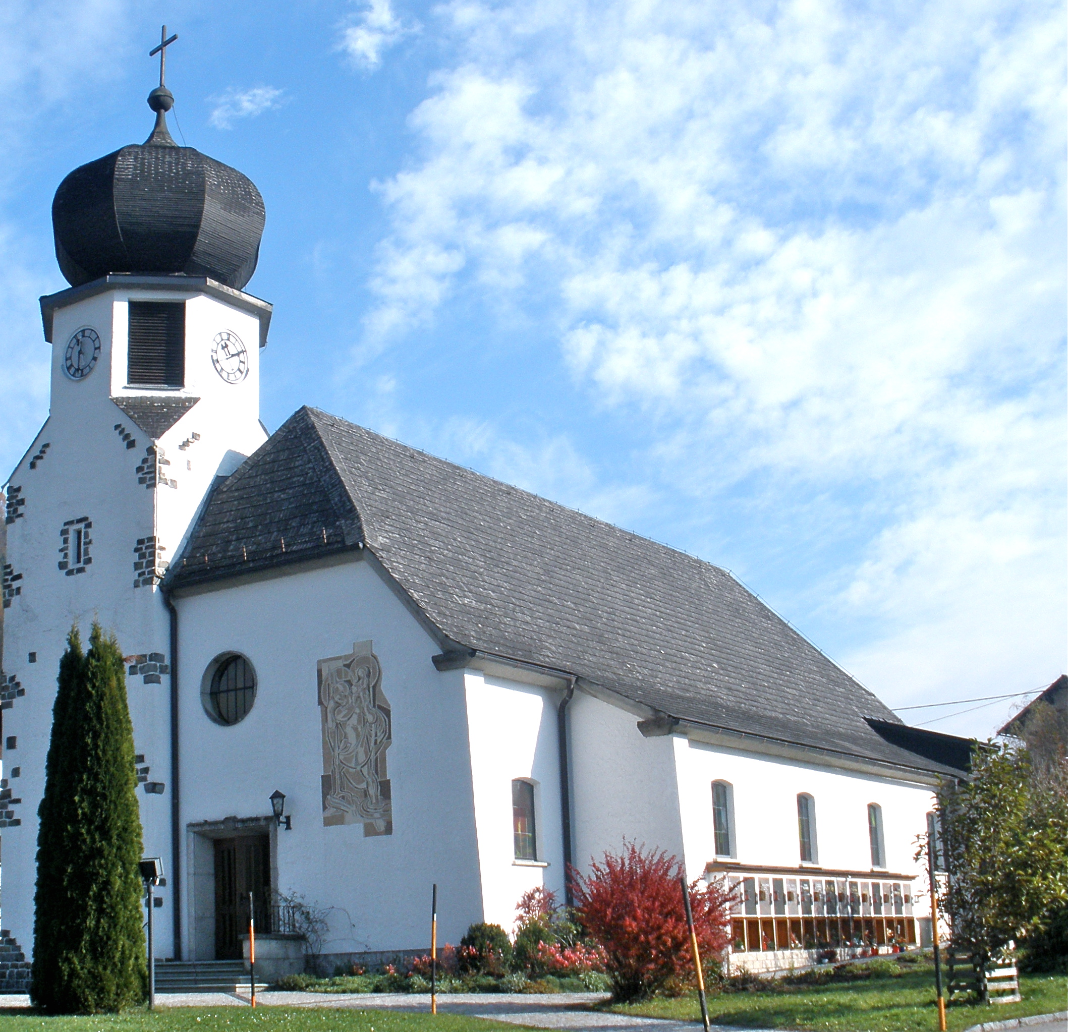 Die Kirche "Heiliger Josef der Arbeiter" in Reindlmühl wurde in den fünfziger Jahren als Filialkirche der Pfarre Altmünster erbaut und 1956 eingeweiht.